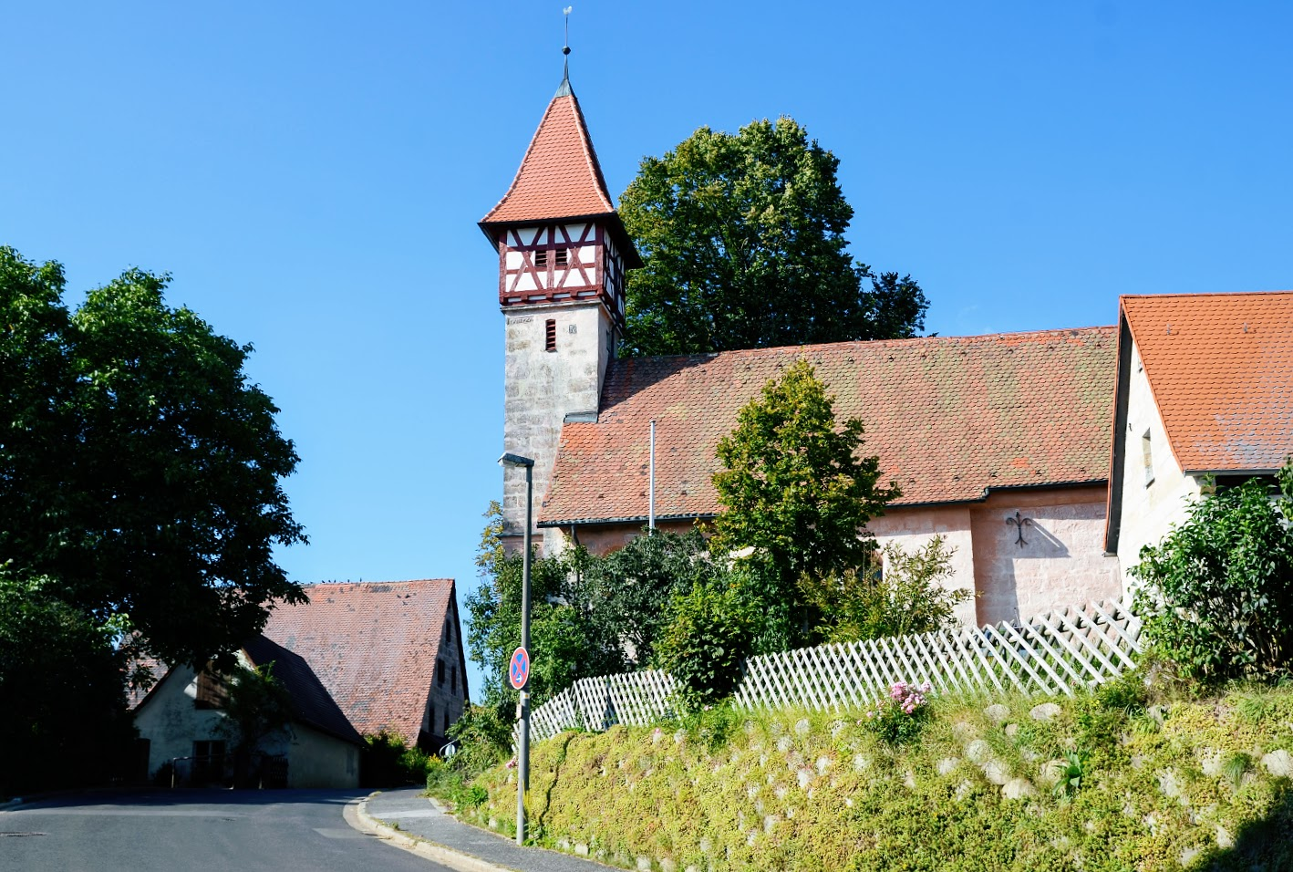 Pfarrkirche St. Johannes des Täufers in Penzenhofen (2017)